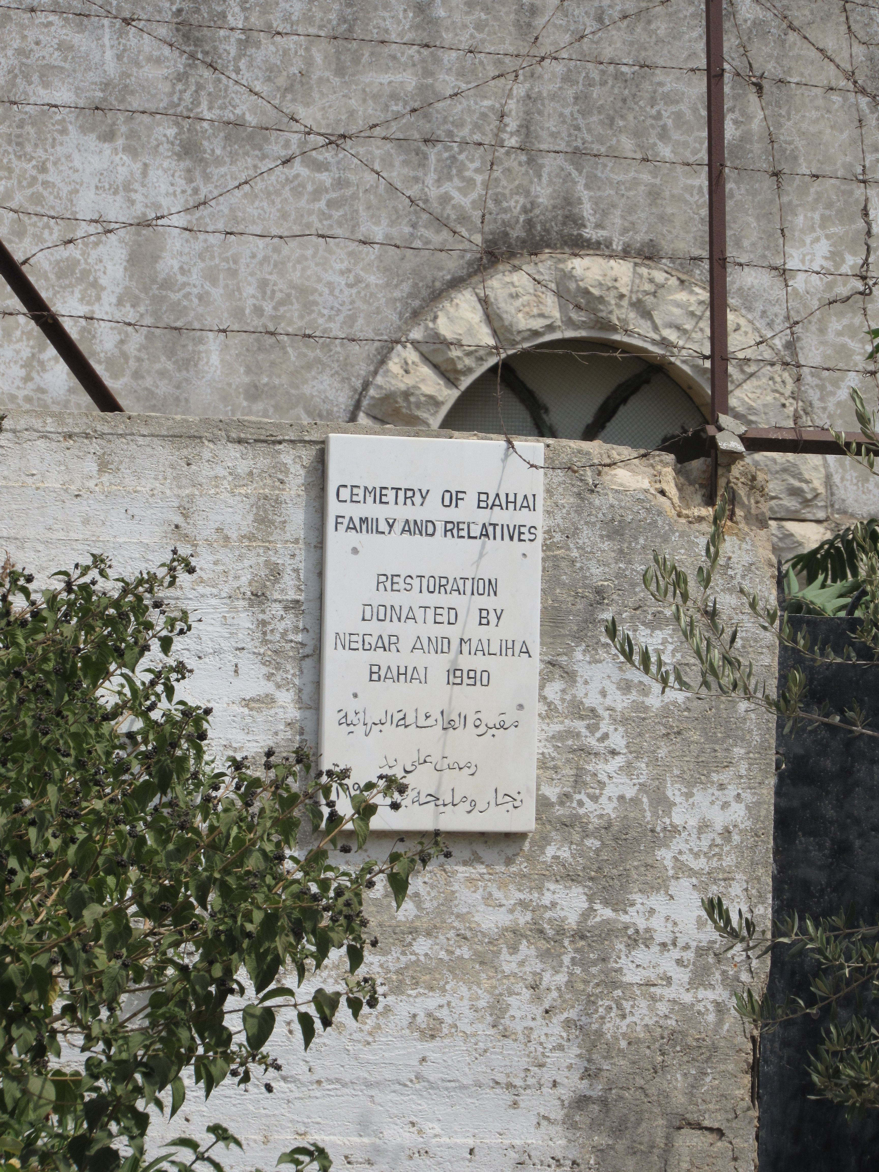 Acre